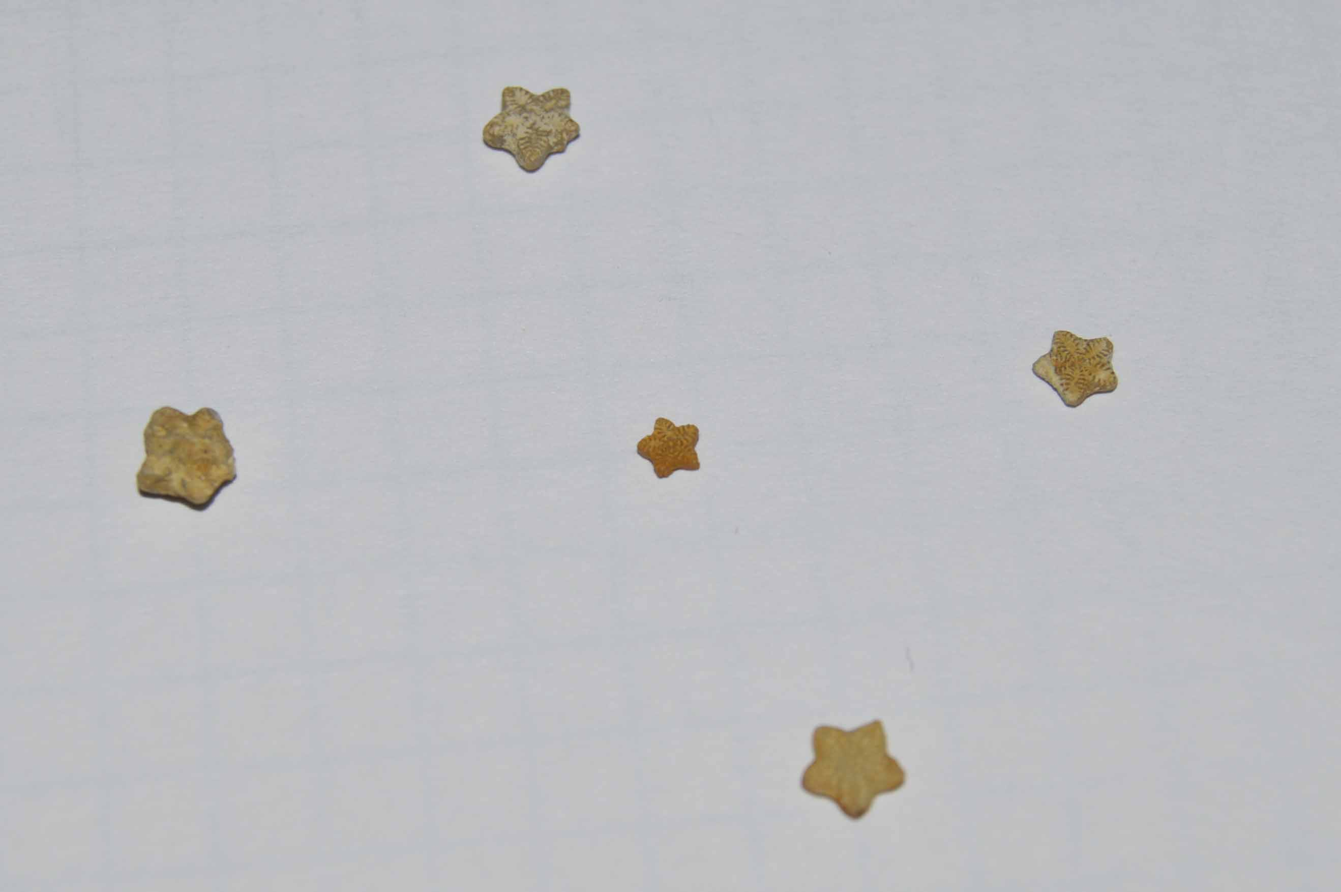 5 "estrellitas" o "estrelletes" de piedra recolectadas por mí en "La Ermita de Nuestra Señora de la Providencia" o "Ermita de Mig Camí", situada en Tortosa, Tarragona. En este caso, las estrellas se muestran en una hoja en blanco, para poder apreciar mejor su forma y estructura.